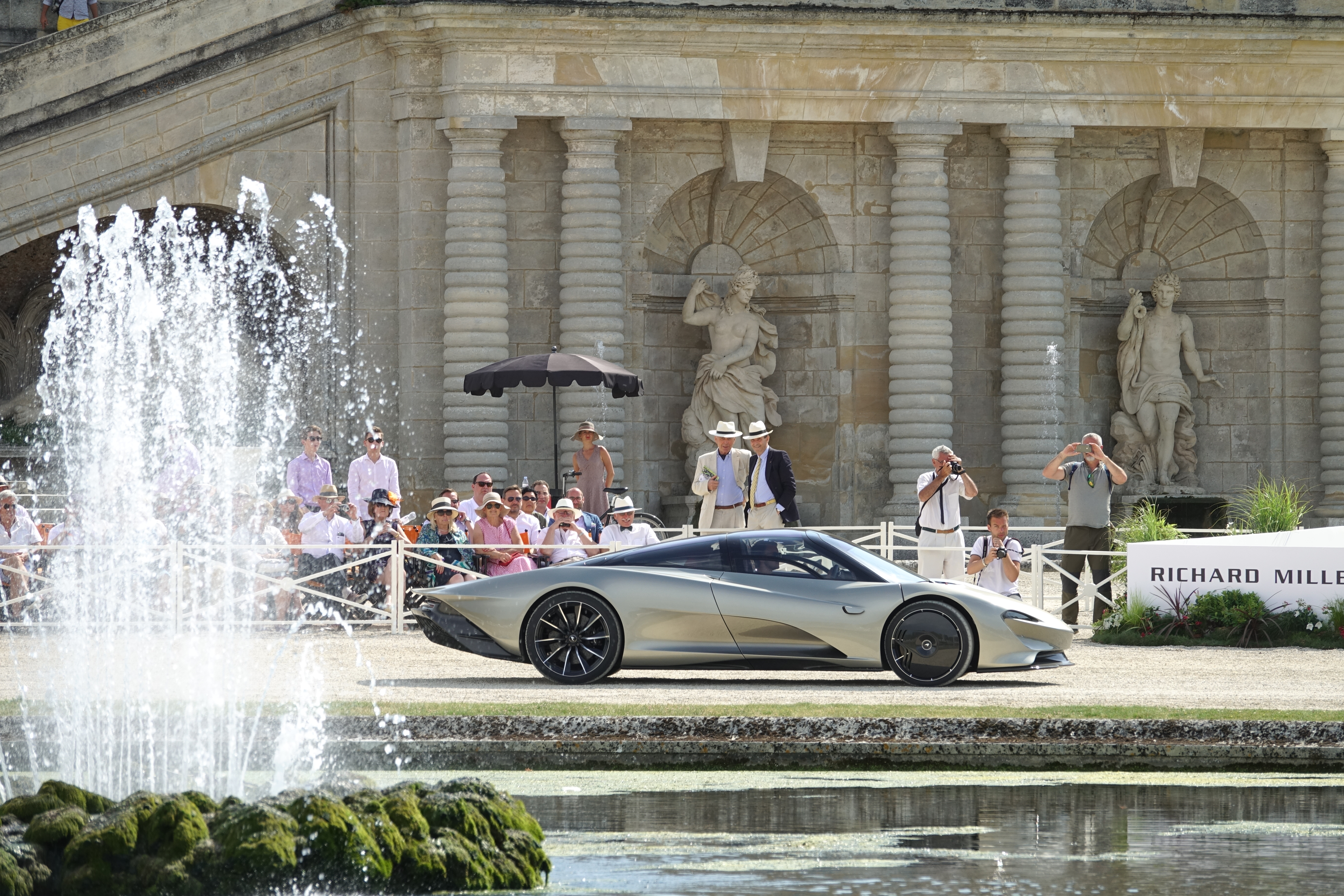 McLaren Speedtail au Chantilly Arts & Elegance Richard Mille 2019